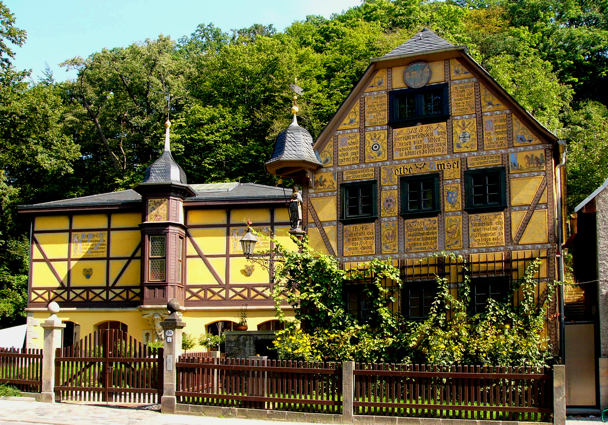 Hentschelmühle ("Rothe Amsel") in Dresden, Germany. Emil August Eduard Leonhardi (* 19. Januar 1828 in Freiberg; † 15. Juli 1905 in Dresden-Loschwitz) war ein deutscher Landschaftsmaler und Sohn des schnell zu Wohlstand gekommenen Dresdner Tintenfabrikanten August Leonhardi (1805–1865). Er erwarb 1879 die ausgediente, ehemaligen Hentschelmühle („Rothe Amsel“) im Dresdner Stadtteil Loschwitz und baute sie u.a. zu einem Atelier um.